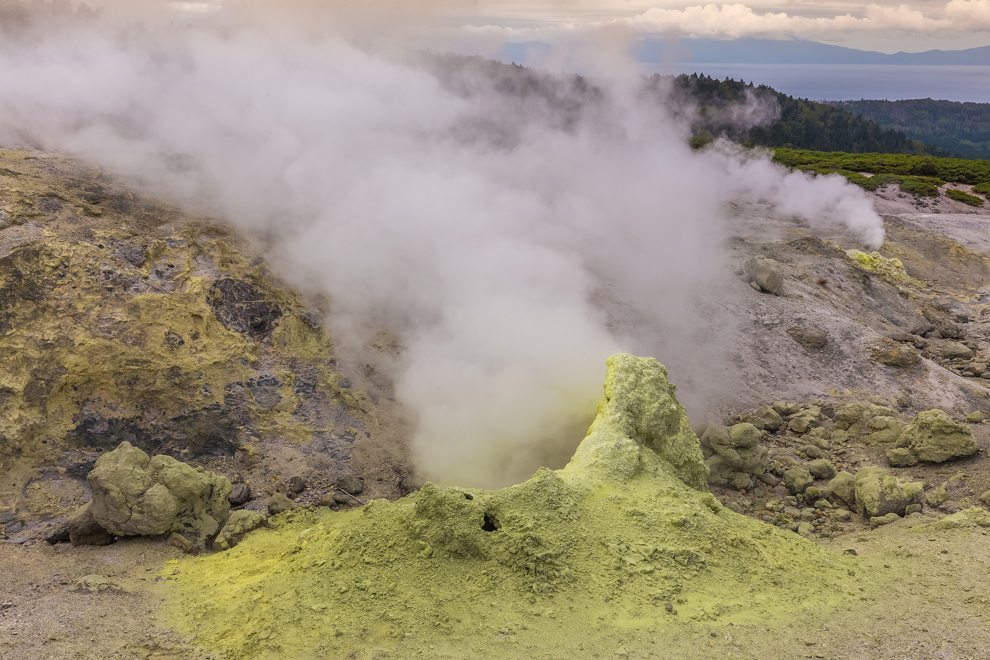 Вулкан Менделеева: Центр - 43°58'38" N 145°44'22" E., Южно-Курильский городской округ, Сахалинская область This image is related to the protected area of Russia number 6510088